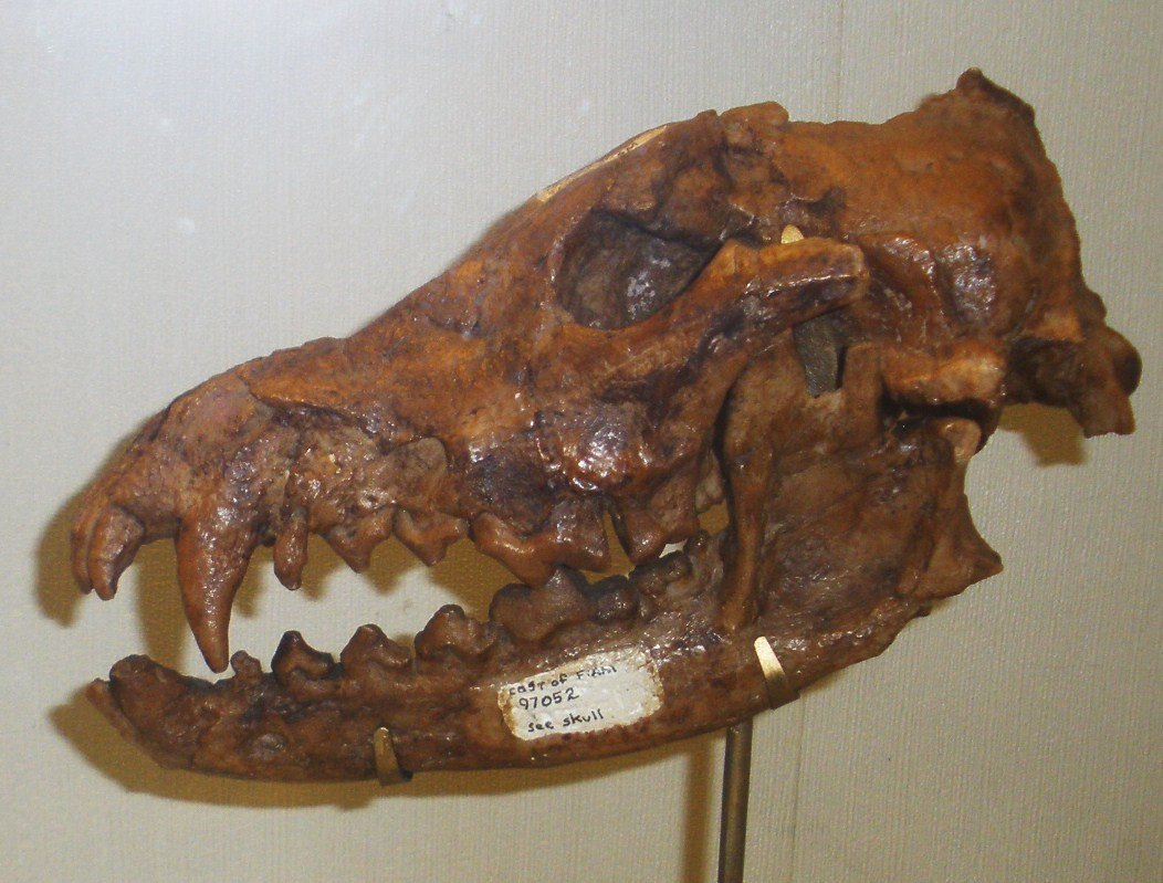 Fossil of Canis cf falconeri, an extinct mammal - Took the picture at Museo di Paleontologia di Firenze